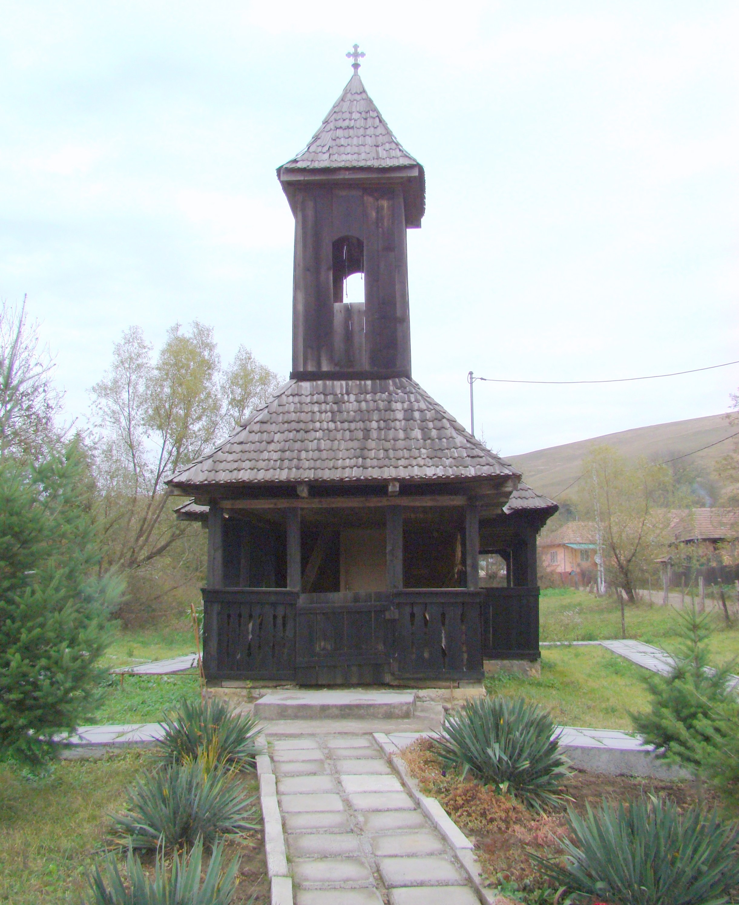 Biserica de lemn „Sf.Arhangheli” din Sânișor, județul Mureș